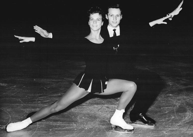 Annerose Baier, Eberhard Rüger Zentralbild Studré 12.11.1964 Internationale Eiskunstlauf-Wettbewerbe Nach dem Pflichttanzen im Eistanz liegt das DDR-Paar Annerose Baier-Eberhard Rüger auf dem 2. Platz. Vom 12.-14.Novermber 1964 finden in der Berliner Werner-Seelenbinder-Halle Internationale Eiskunatlauf-Wettbewerbe um die Pokale des Deutschen Eislauf-Verbandes für Damen, Herren, Paare und Eistanzen statt.